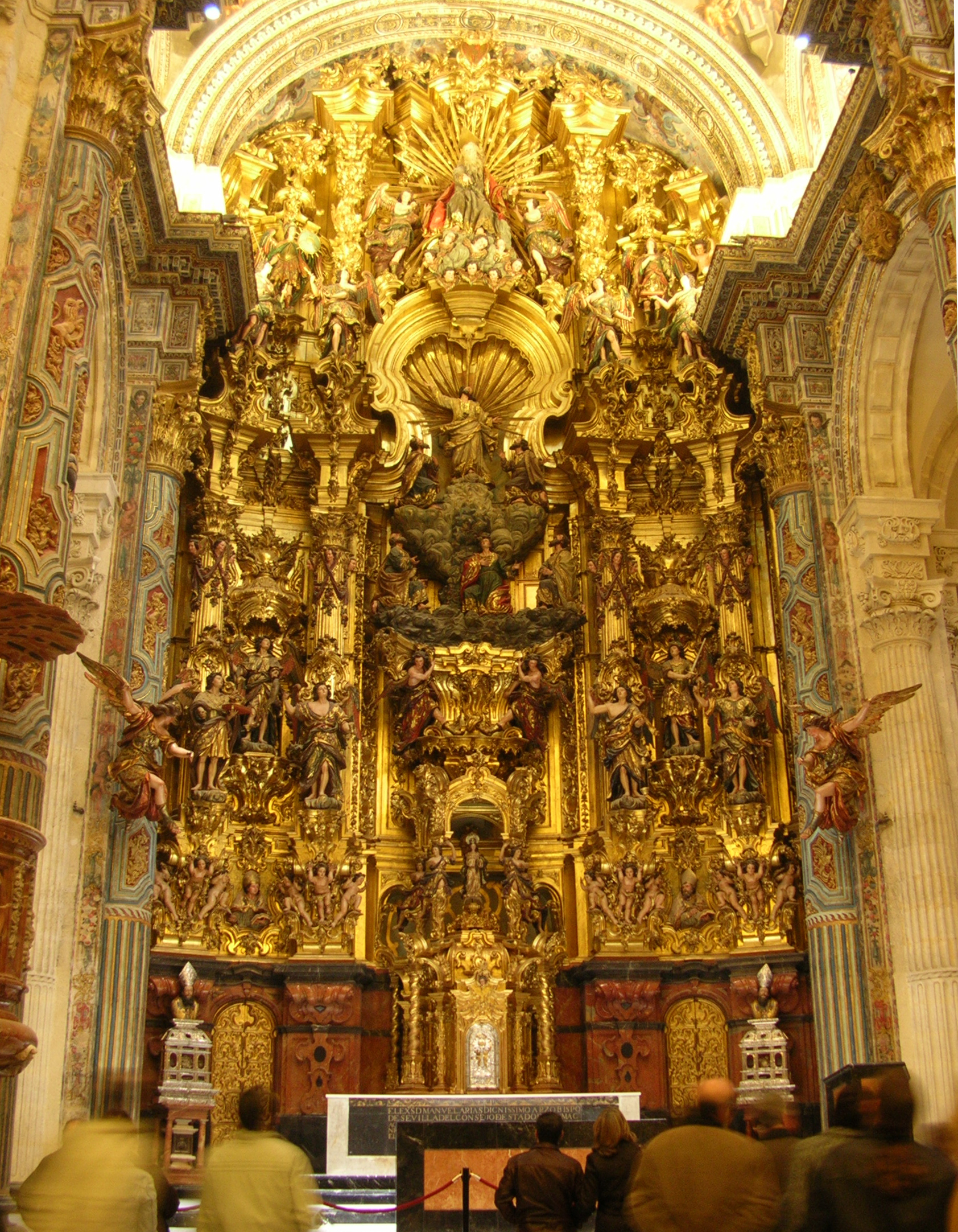 Eglise du Divino Salvador de Séville, intérieur après 5 ans de travaux